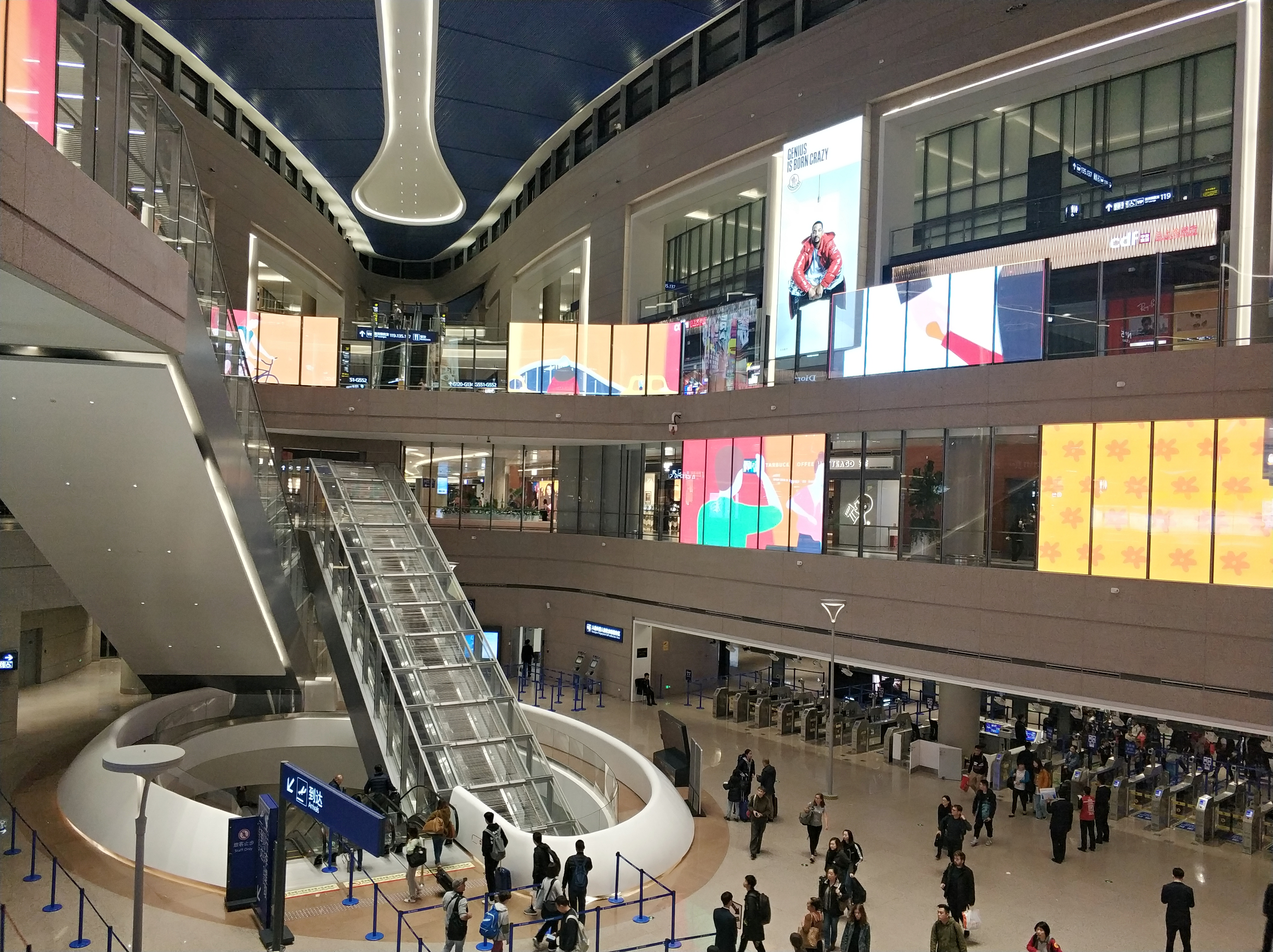 中文（中国大陆）: 上海浦东机场卫星厅S1中转大厅